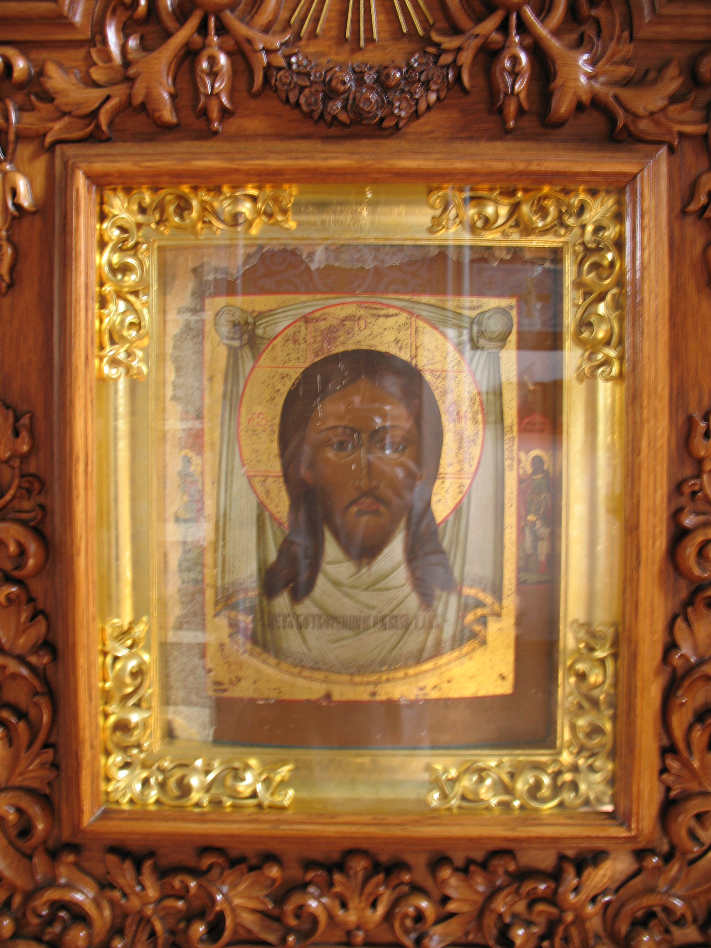 Нерукотворенный Образъ Г(оспо)день. Обновившаяся 20 июля 1997 года икона Спаса Нерукотворного (Водяное, Змиевской район, Борисоглебский монастырь). Слева на полях изображён С(вя)тый Архис(тратиг) Михаил, справа - С(вя)тый Арх(анге)л Рафаил.